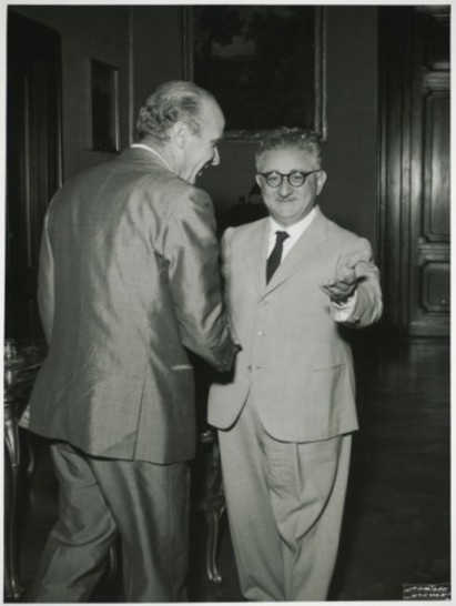 Il presidente della Camera dei Deputati Giovanni Leone riceve il governatore Banca d'Italia Guido Carli